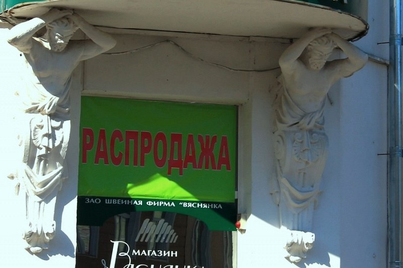 Будынак крэдытнага таварыства. Атланты